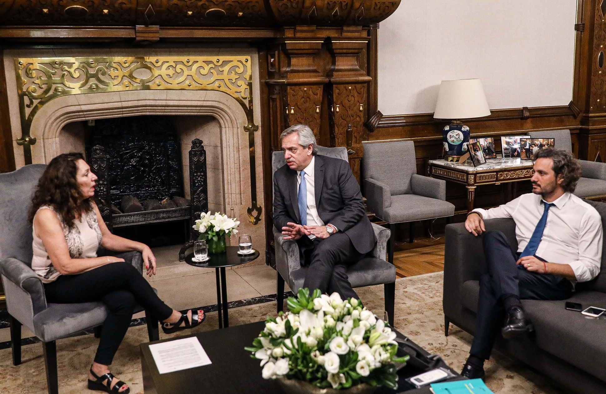 El presidente Alberto Fernández recibió en Casa Rosada a la fiscal Cristina Caamaño, quien fue designada como interventora de la Agencia Federal de Inteligencia (AFI). El mandatario nacional estuvo acompañado por el jefe de Gabinete, Santiago Cafiero.